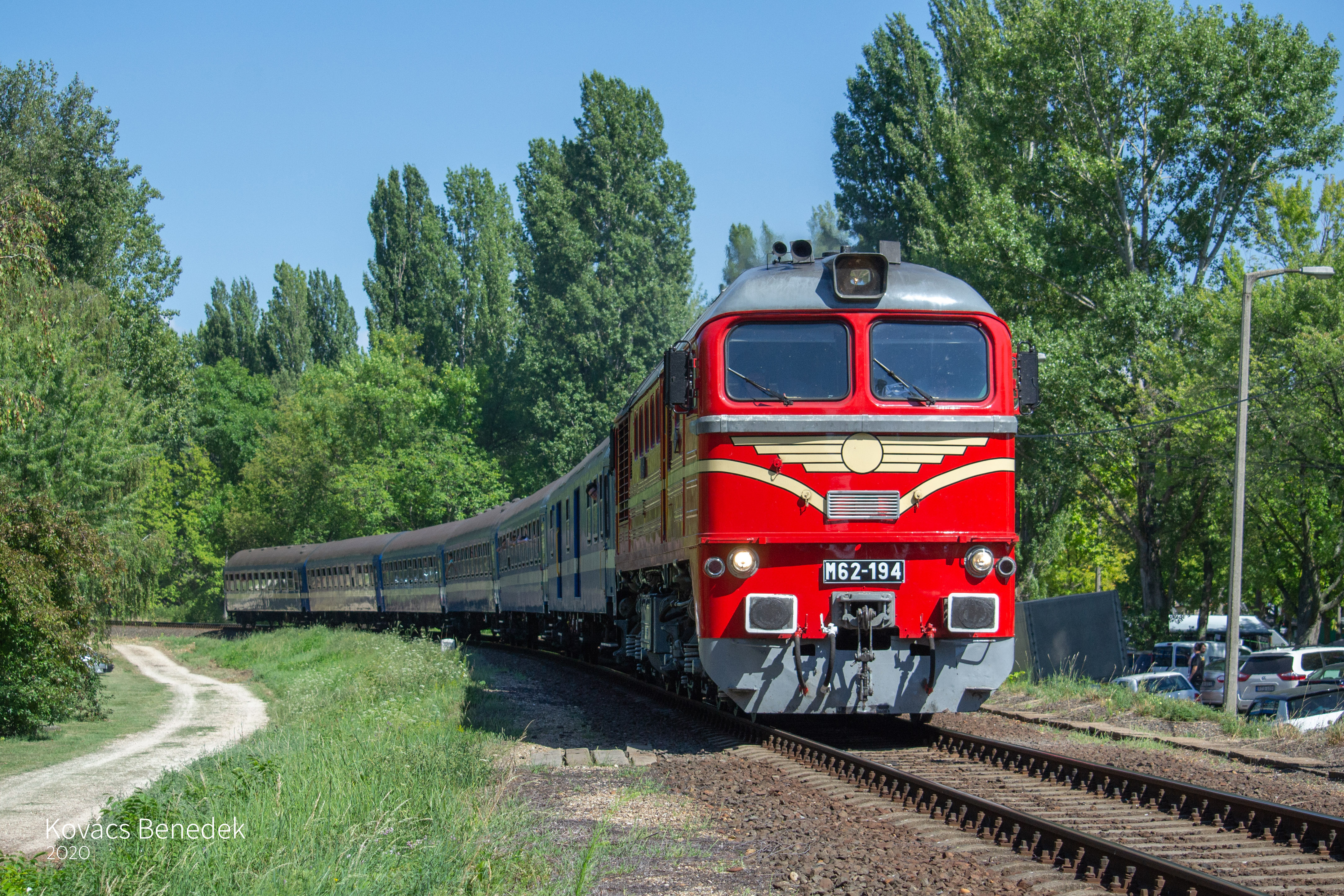 194-es retró Szergej Révfülöpnél